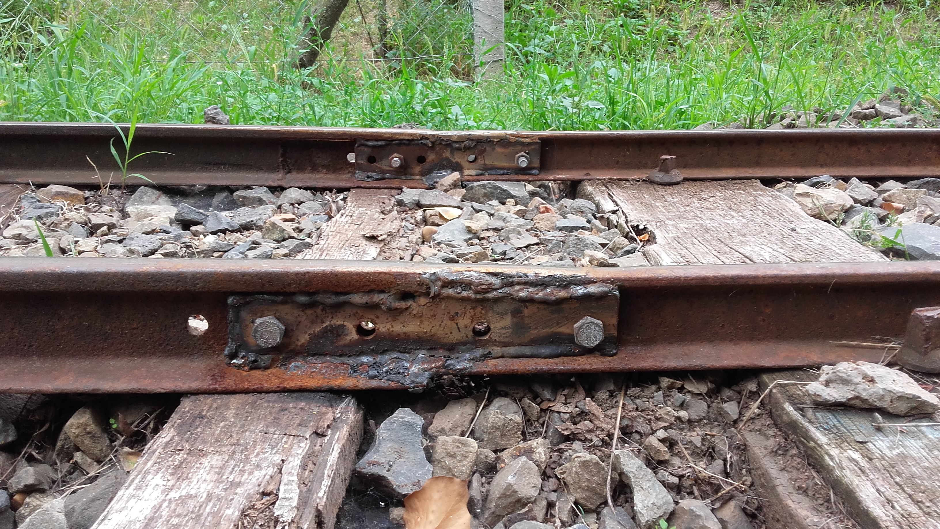 A pályában a fűtőház sarkánál lévő kis sugarú ívben sínhegesztéssel rögzítették össze a vágánymezőket. Ha jól megfigyeljük itt találkoznak a 7 kg/fm és a 9 kg/fm rendszerű sínszálak.